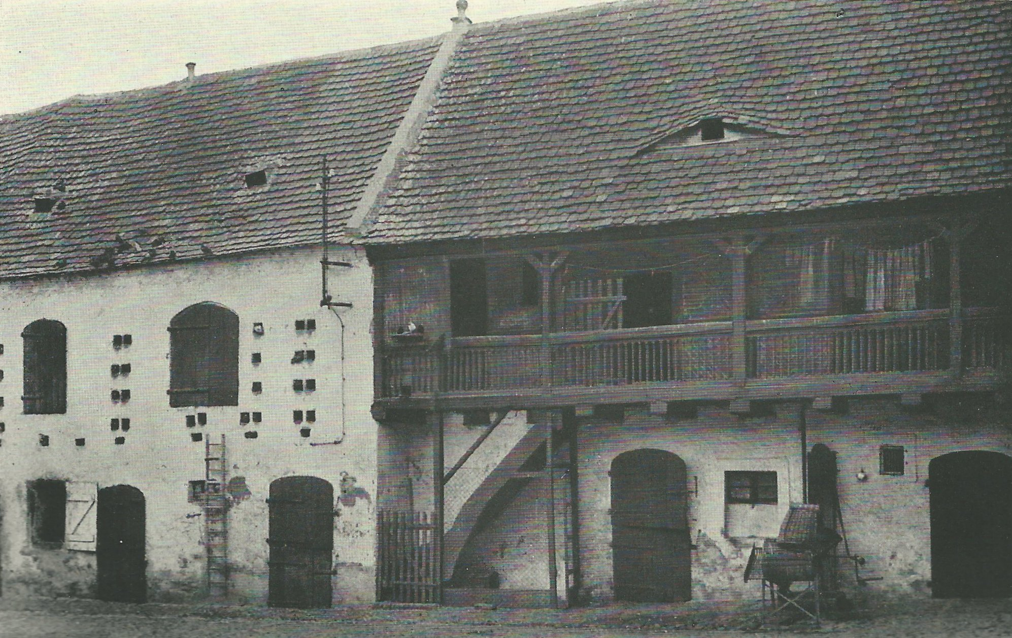 Hofgalerie und Taubenwand Bauerngehöft Schwaneberg, 1935 oder früher Das Bild wurde 1935 im Buch von Eduard Stegmann, Aus dem Volks- und Brauchtum Magdeburgs und der Börde, Magdeburger Kultur- und Wirtschaftsleben Nr. 4, Herausgegeben von der Stadt Magdeburg, Seite 9